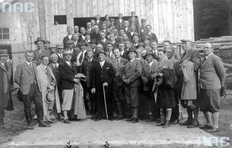 Konferencja gospodarczo - leśna. W środku z laską Wojciech Bucior